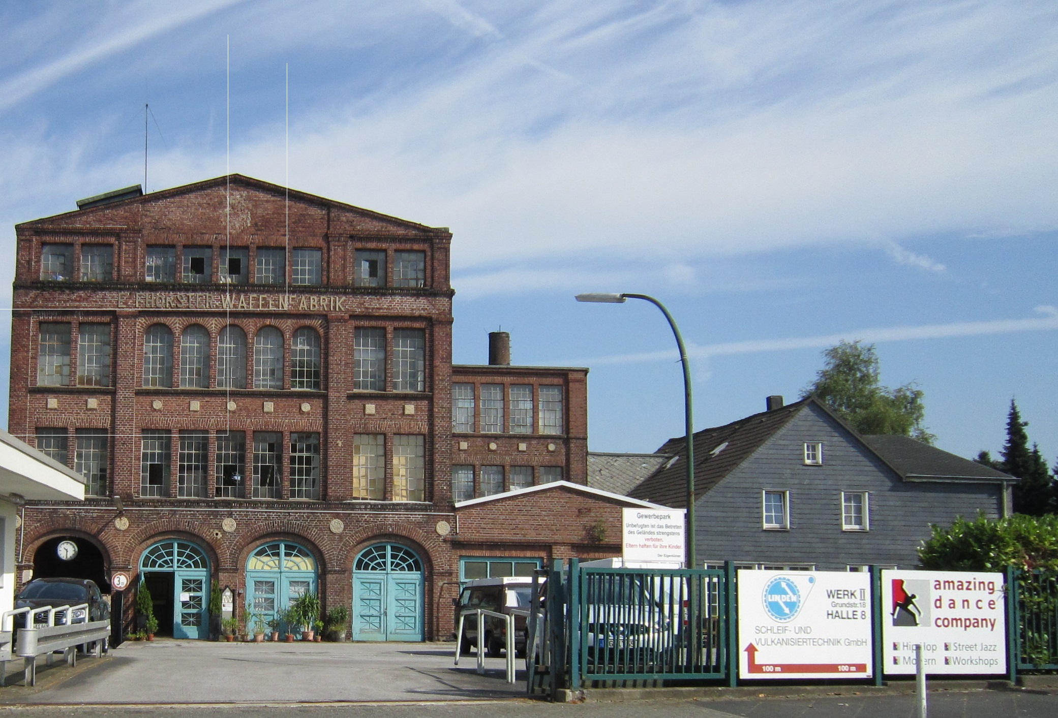 Frontansicht der ehemaligen Waffenfabrik an der Katternberger Straße in Solingen, im Sommer 2014